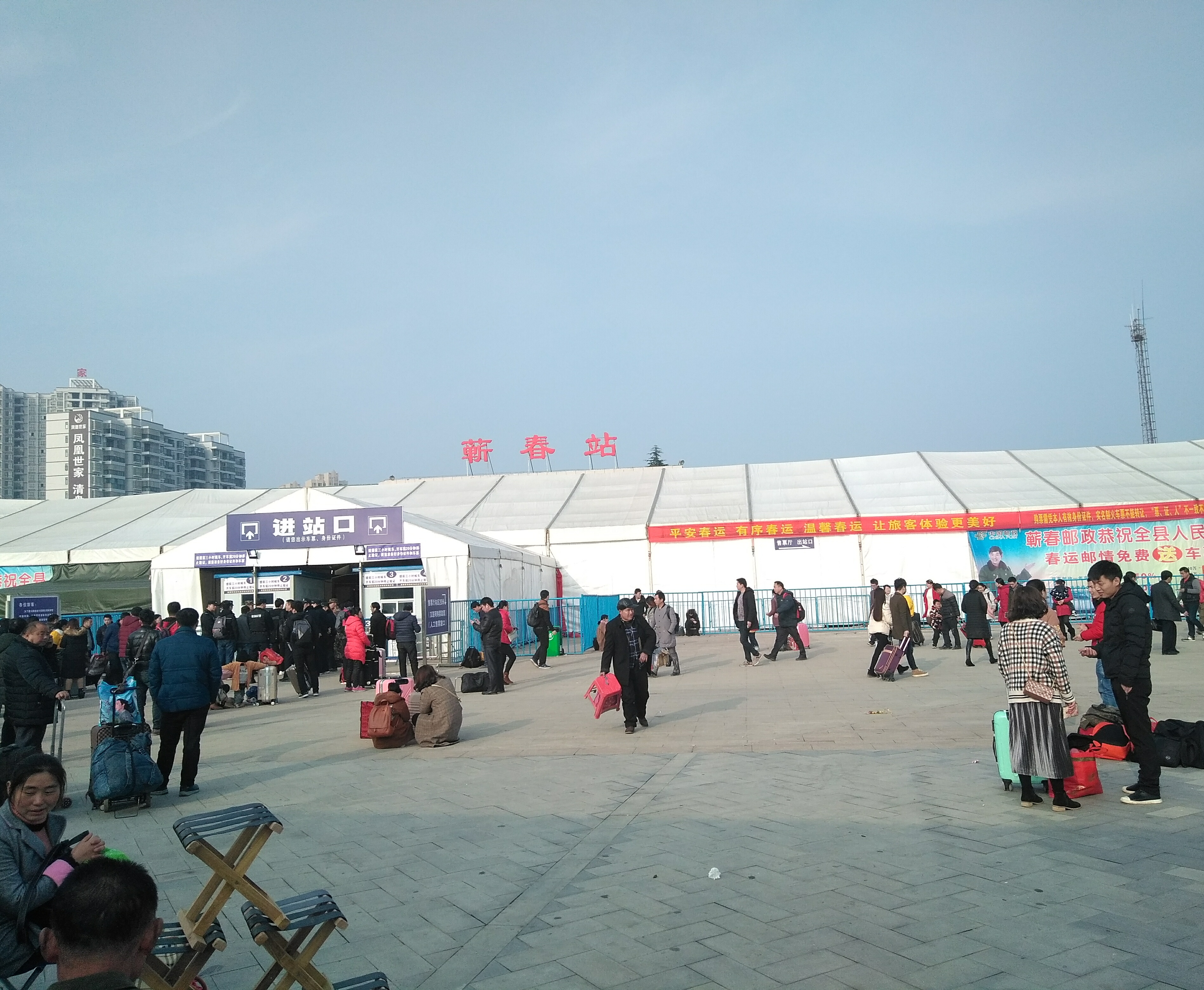 摄于春节期间